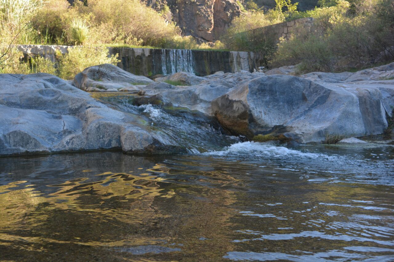 Paisaje